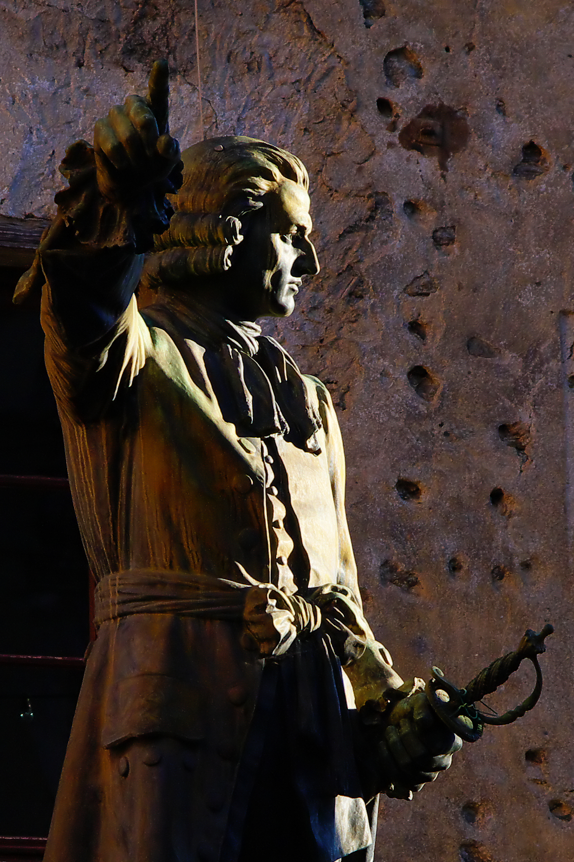 Statue of Jean-Pierre Gaffori at Place Gaffori in Corte, Corsica, France